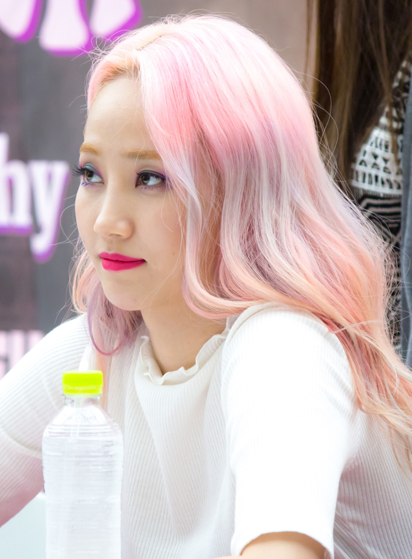 Yenny at a fanmeet on July 15, 2016.